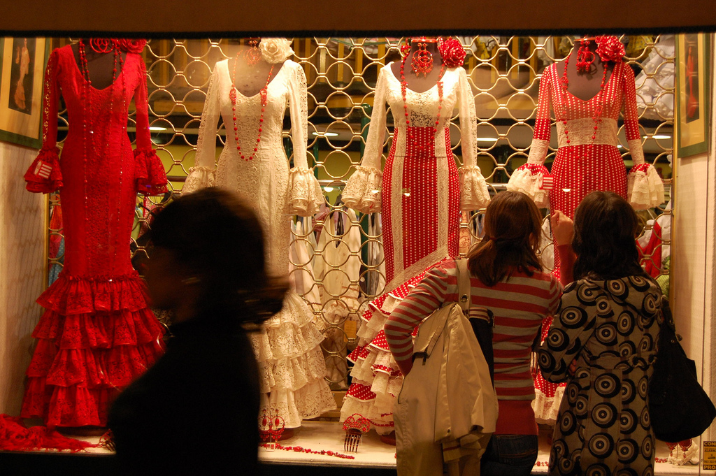 Tienda de trajes de flamenca. Sevilla. España